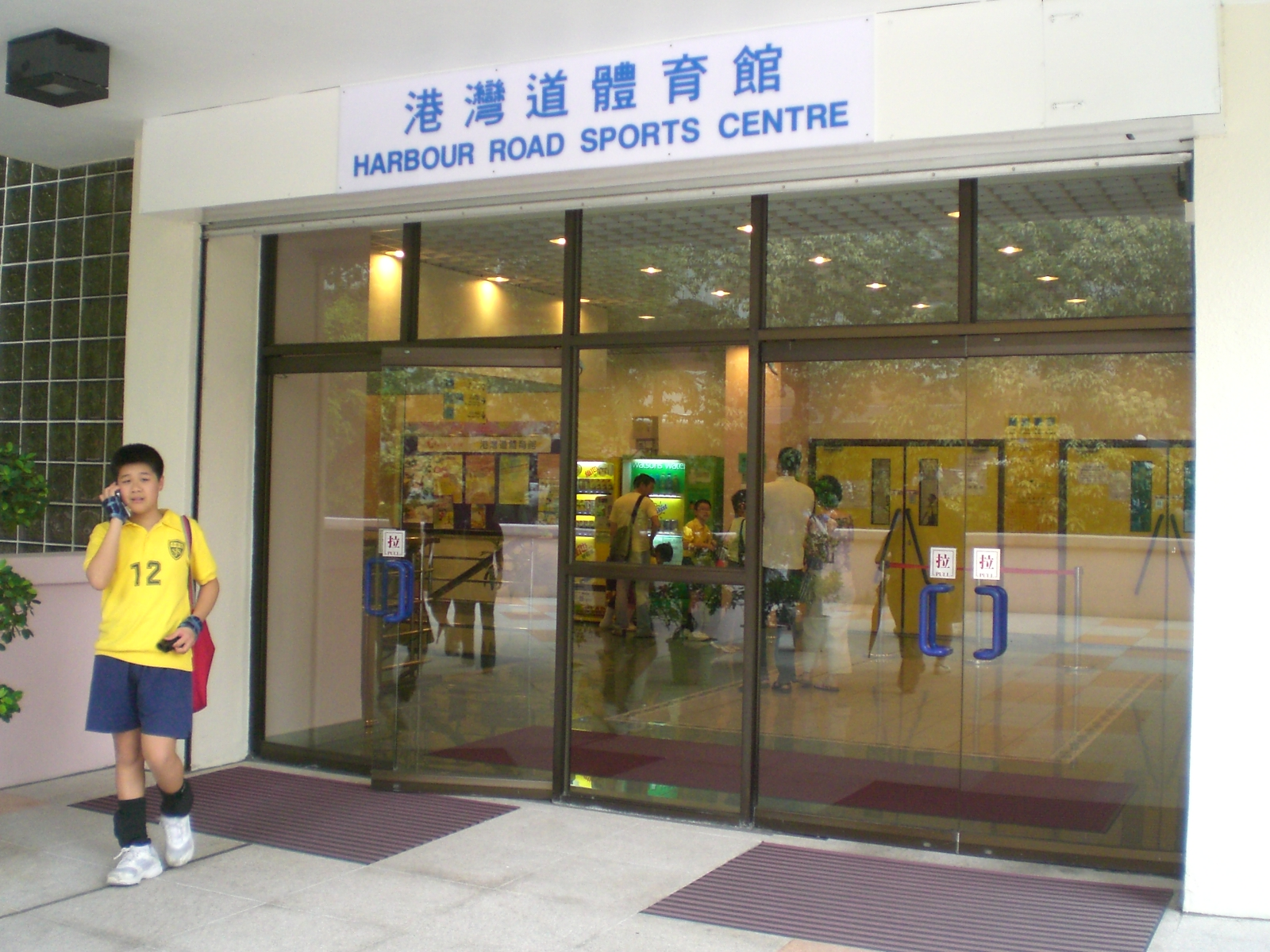 灣仔北行人平台上的港灣道體育館，其附設有露天公眾標準游泳池。